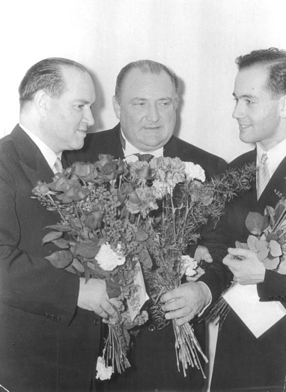 Zentralbild-Zimontkowski Quasch-Krz 24.4.1957 David und Igor Oistrach gastierten in Berlin Die beiden begabten Geigenvirtousen aus der Sowjetunion David und Igor Oistrach gaben am 14.4.1957 ein Konzert in der Deutschen Staatsoper in Berlin. Es spielte das Leipziger Gewandhausorchester unter der Leitung von Nationalpreisträger Franz Konwitschny. UBz: Nach dem Konzert (v.l.n.r.) David Oistrach, Nationalpreisträger Franz Konwitschny und Igor Oistrach.